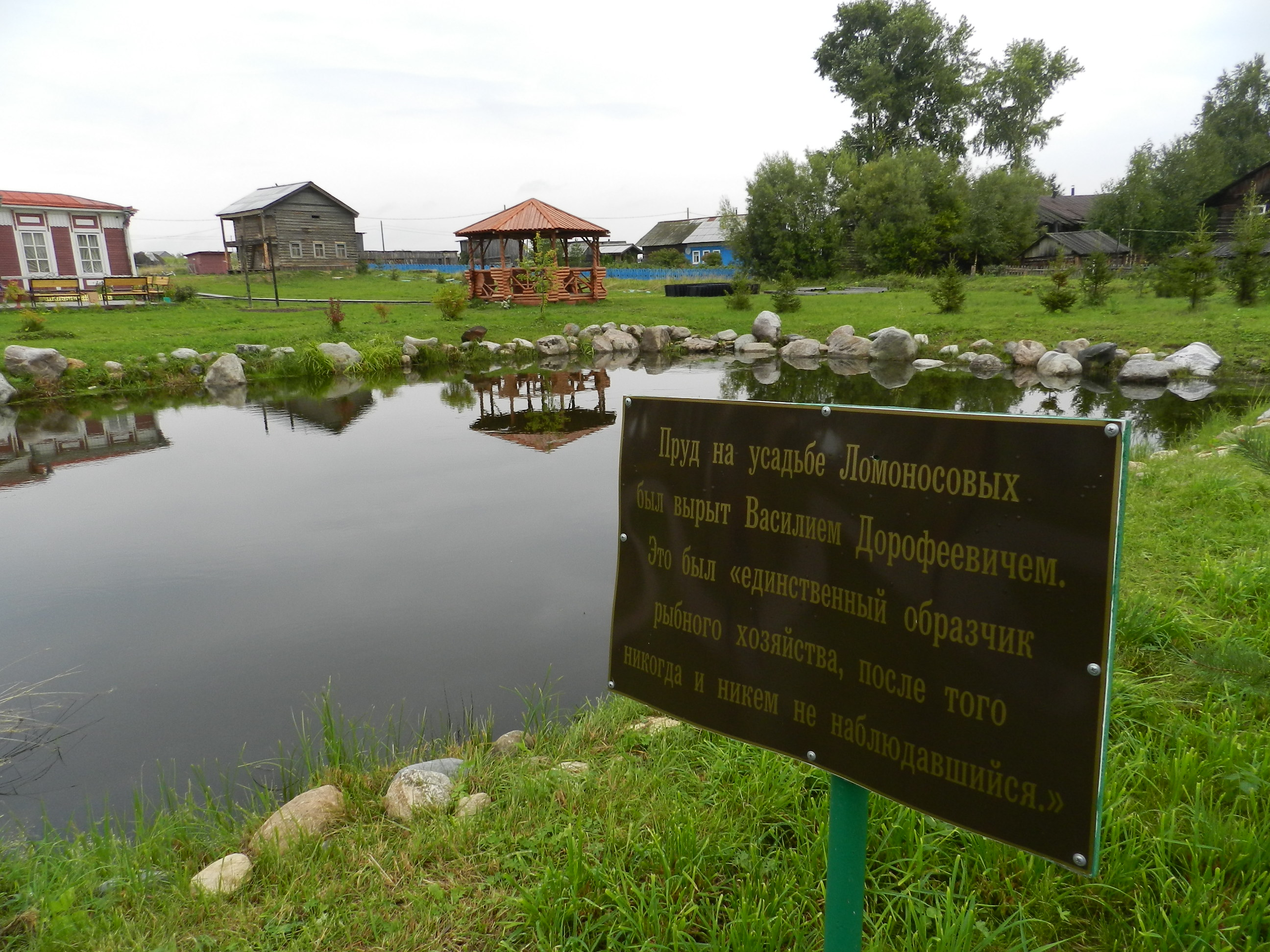 Пруд у восстановленной усадьбы Ломоносовых (ныне музей Ломоносова) в селе Ломоносово